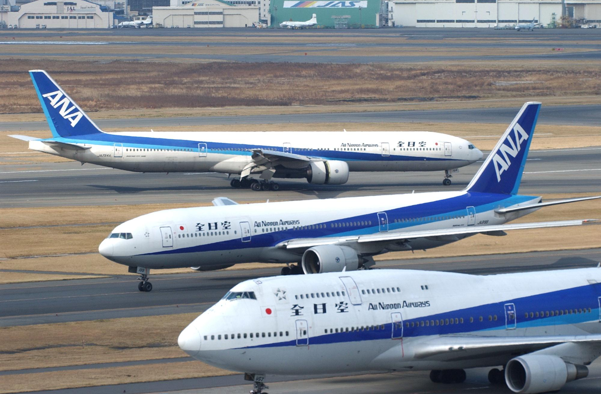 Taken at Haneda on January 22, 2003.